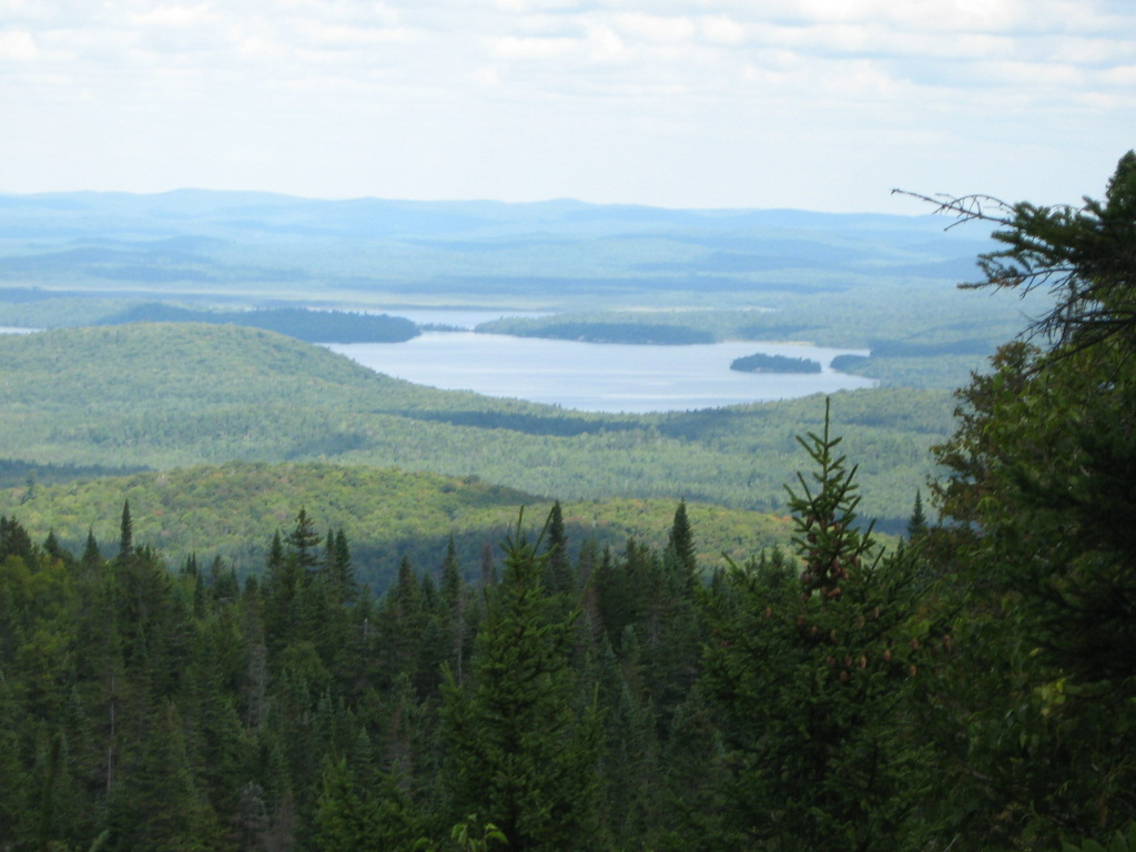 Vu du sommet du Carcan dans le Parc national du Mont-Tremblant